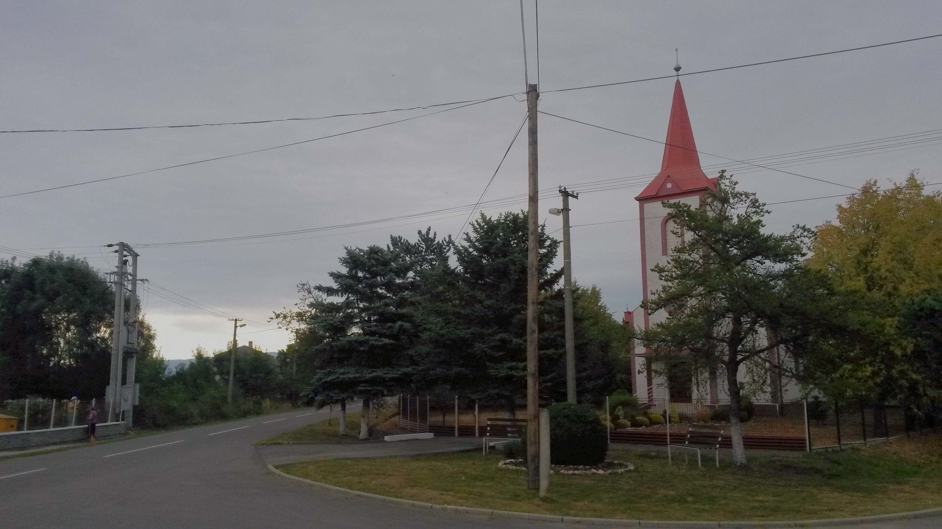 Kostol, Svätuš